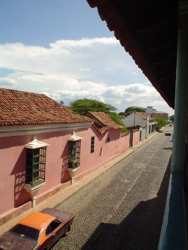 Calle in Coro, Falcon, Venezuela